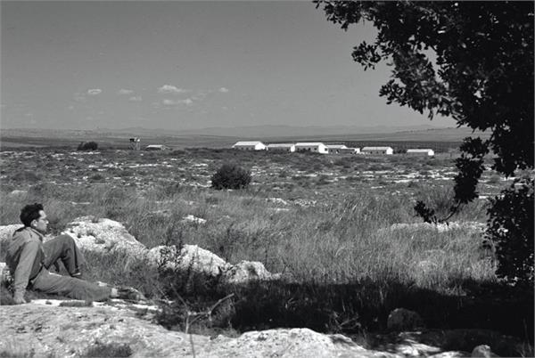 בית קשת - מראה חלקי